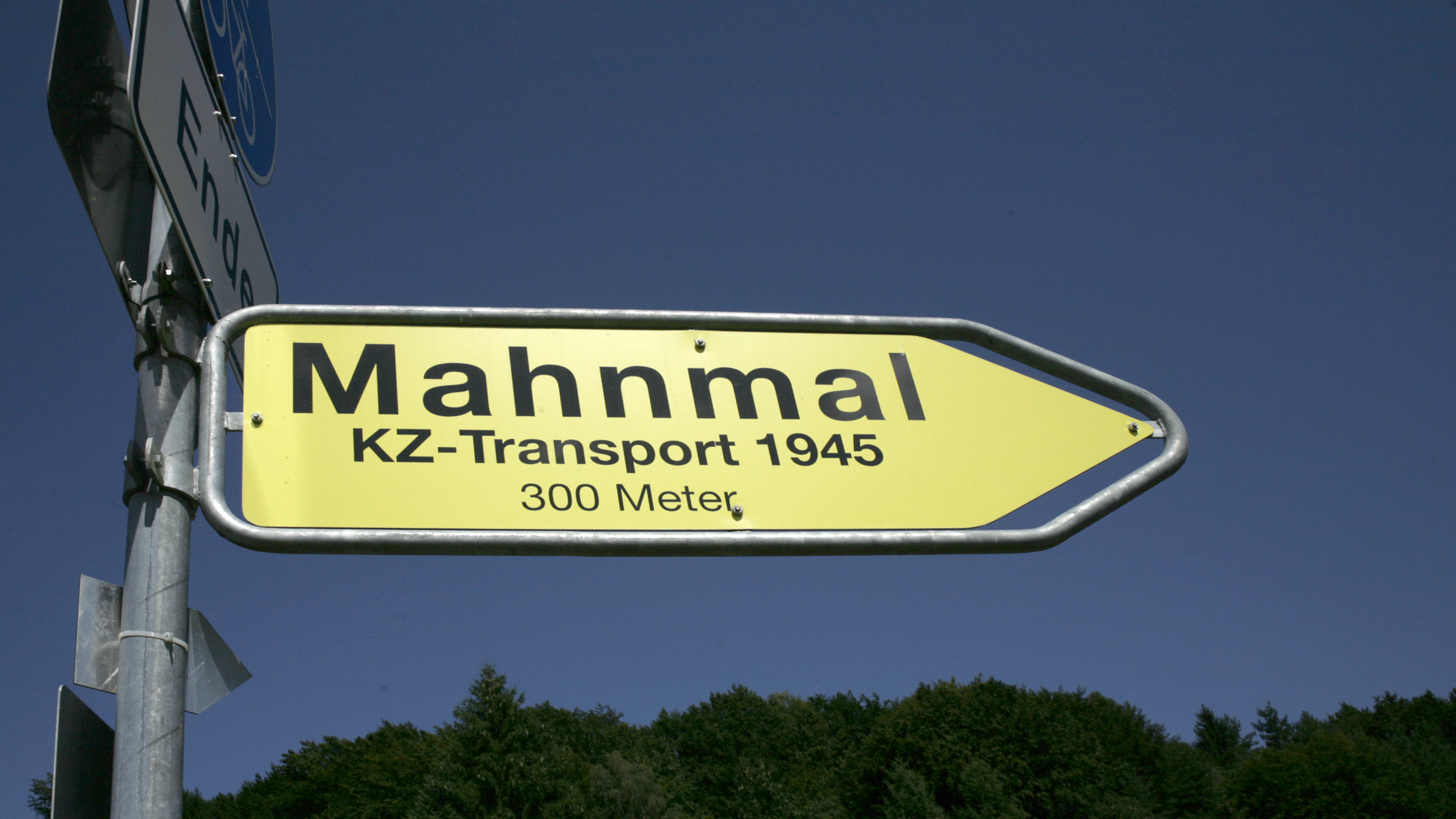 Wegzeiger zum Mahnmal KZ-Transport 1945 bei Nammering.